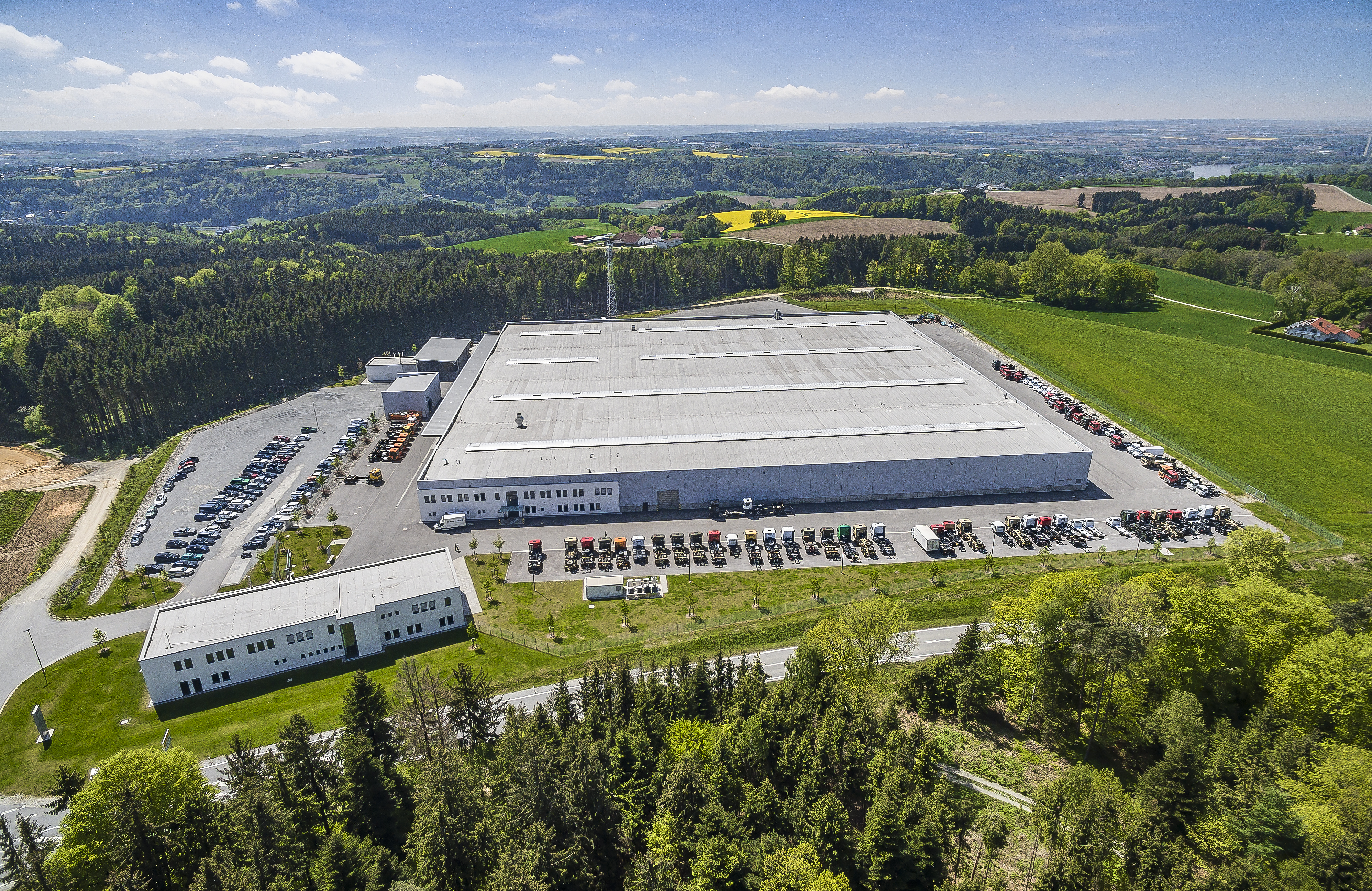 Luftbild: Werk Albersdorf-Vilshofen an der Donau